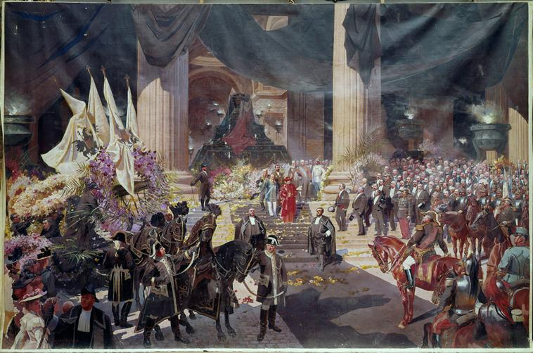 Funérailles de Sadi Carnot 1er juillet 1894 Le peintre Georges Bertrand reçoit la commande d’un tableau commémorant la cérémonie. Après avoir pensé représenter l’intérieur de l’édifice, avec l’hommage de la Nation devant le catafalque, il représente le portique du Panthéon devant lequel « Les représentants de la Nation française remercient les représentants des puissances étrangères de l’hommage qu’ils sont venus rendre au président Carnot ». La grandiose mise en scène est traitée dans un camaïeu de noirs, de gris et de blancs, rehaussée seulement par le cortège chamarré des représentants étrangers, derrière le nonce apostolique, tout de pourpre vêtu.